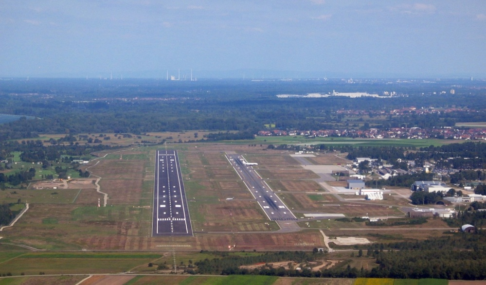 Anflug auf Piste 03 des Flughafens Karlsruhe/Baden-Baden nach Sanierung